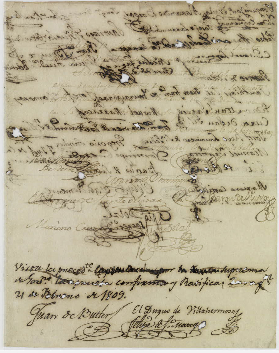 Capitulation de Saragosse à l'issue du deuxième siège de la ville, troisième page signée par le Maréchal Lannes et Pedro María Ric